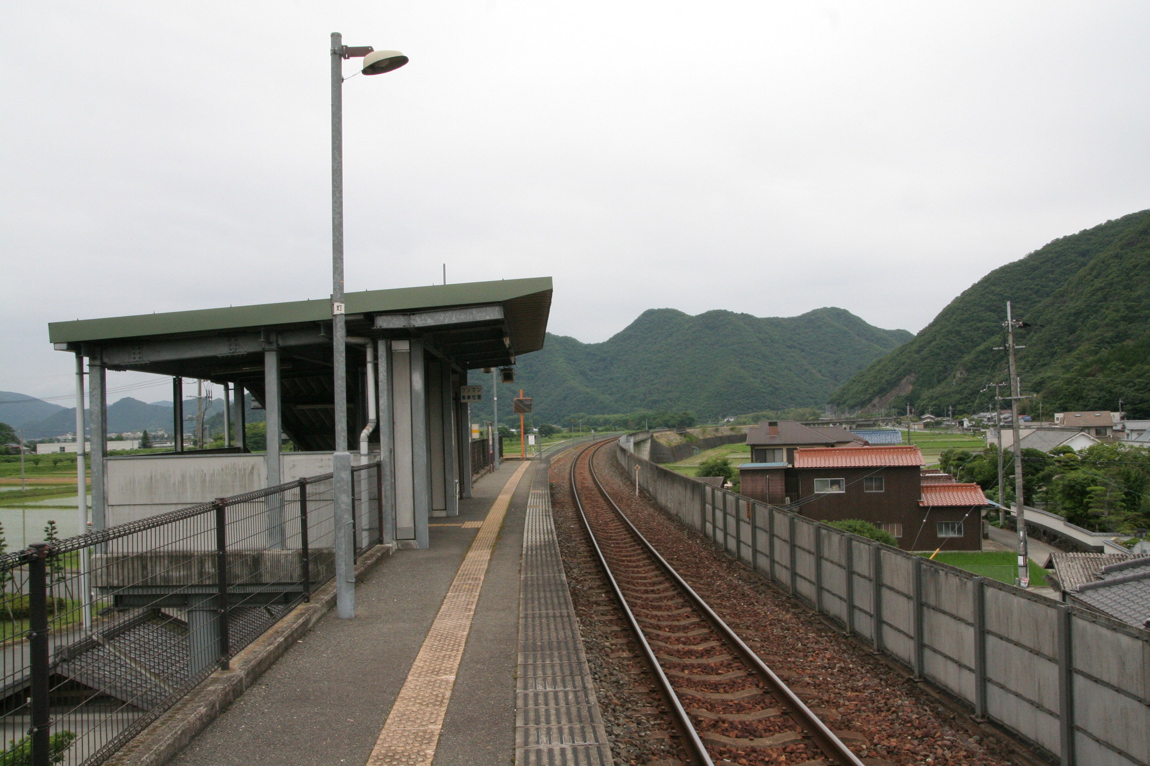 智頭急行 苔縄駅の構内